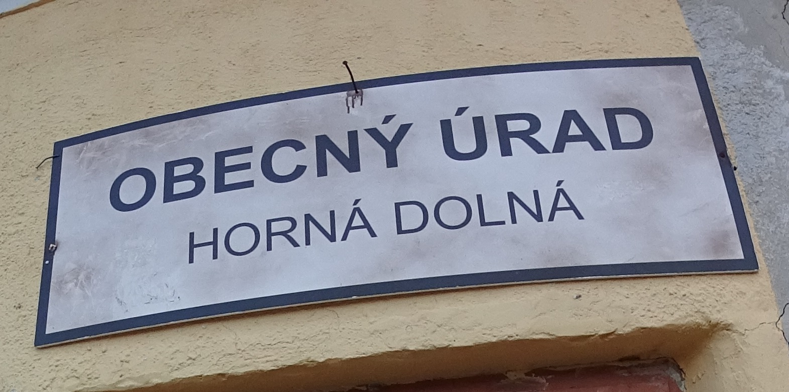 Horná Dolná, exteriéry Novej Lehoty